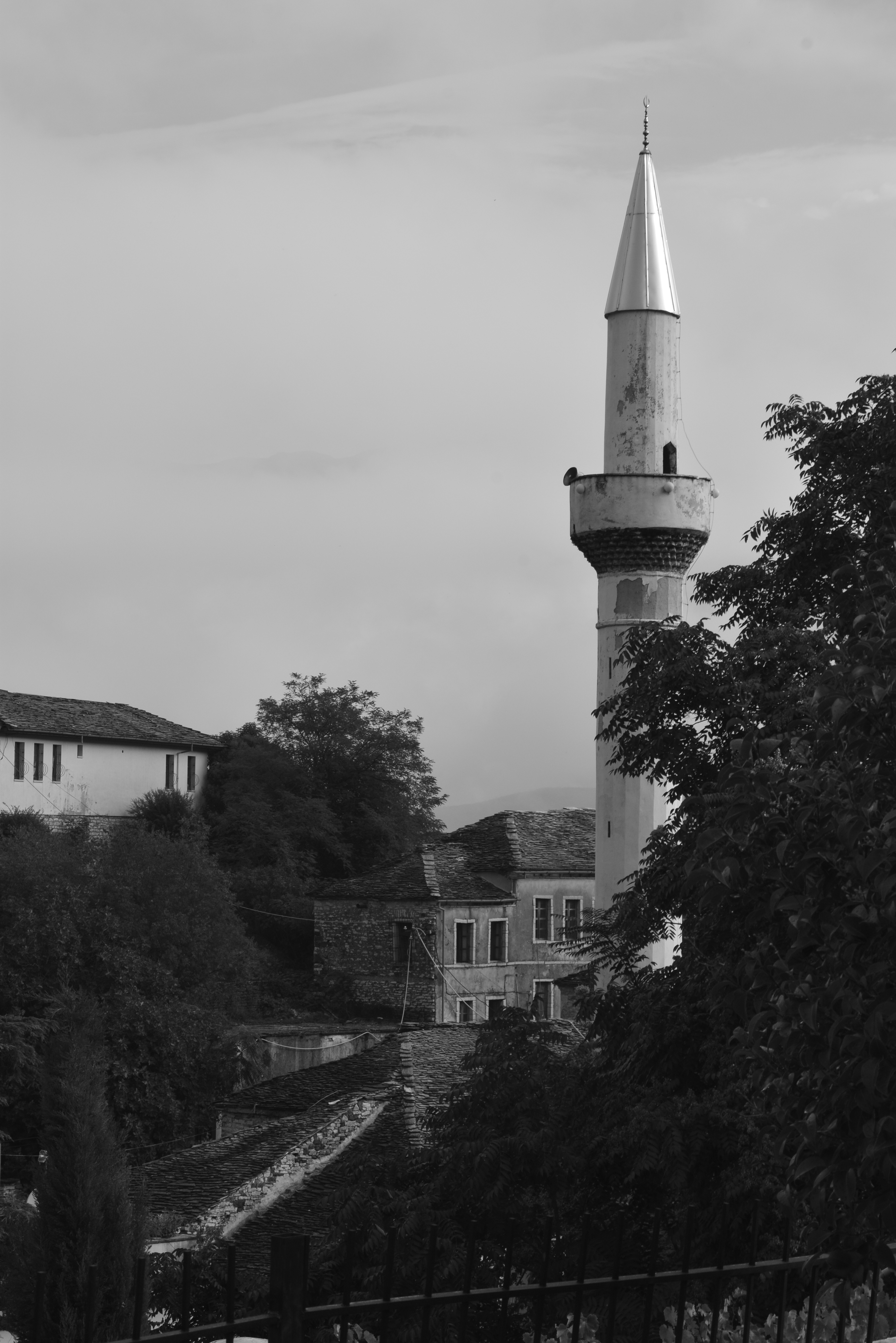 qytet monument